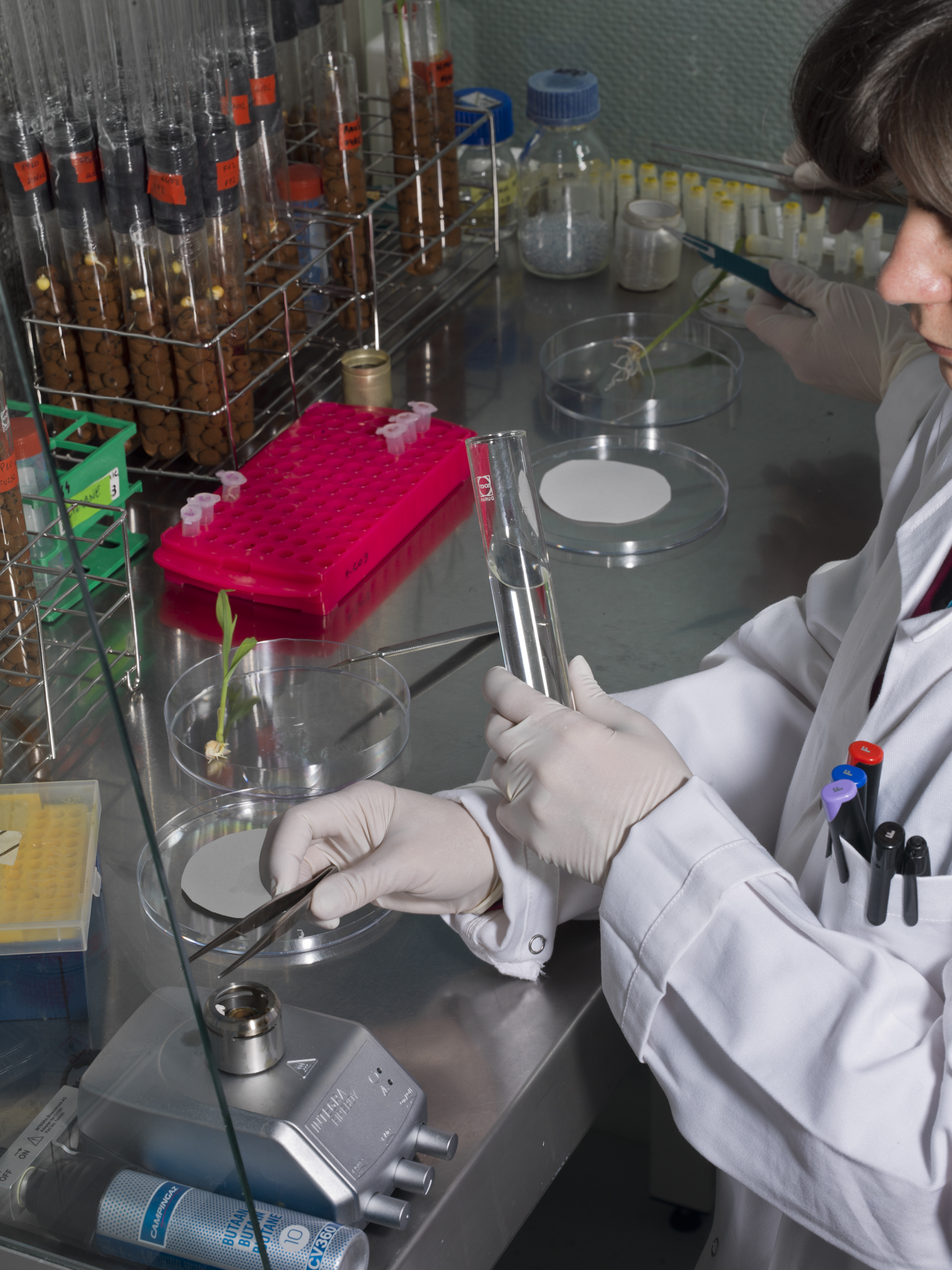 INRA, Jean Weber